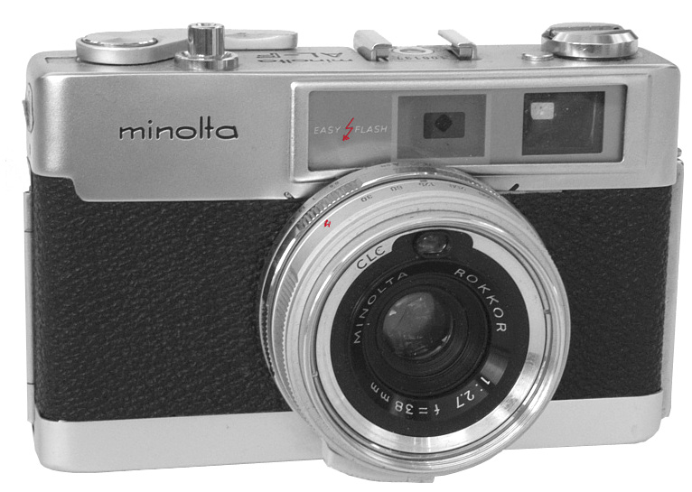 Die Minolta AL-F erschien 1967 und ist ein robustes, zuverlässiges Gerät mit gekuppeltem Entfernungsmesser. Sie besitzt eine Blendenautomatik mit Zeitvorwahl, wird aber dadurch eingeschränkt, dass die Automatik nicht abschaltbar ist und keine langen Zeiten einstellbar sind. Der Zeitenbereich geht von 1/30 s bis 1/500 s. Das in die Belichtungsmessung integrierte CLC(Contrast Light Compensation)-System scheint zu funktionieren, zumindest hält sich die Unterbelichtung bei Gegenlicht in Grenzen.Die von der Automatik gewählte Blende wird im Leuchtrahmensucher angezeigt. Der horizontale Parallaxenausgleich geschieht automatisch, für die vertikale Verschiebung muss man die Parallaxenmarken beachten.Die „Easy Flash“-Automatik besagt, dass nach Einstellen der Blitz-Leitzahl die Blende sich automatisch nach der Entfernung richtet (LZ von 14 bis 56).Das Objektiv ist ein Rokkor 1:2,7/38 mm (4 Linsen in 3 Gruppen) und erfreut durch eine sehr gute Leistung. Die einstellbare Filmempfindlichkeit geht von 25 bis 500 ASA (15 bis 28 DIN). Ein Selbstauslöser fehlt, dafür gibt’s einen „heißen“ Blitzschuh.Benötigt wird eine Quecksilber-Zelle PX 625, die nicht mehr hergestellt wird. Es gibt relativ teuren Zink-Luft-Ersatz, man kann bei Negativ-Film aber auch Alkaline-Zellen verwenden (die Abweichung wird vom Film hinreichend aufgefangen – oder man justiert halt die Empfindlichkeits-Einstellung).Abmessungen: 128x85x60 mm; Gewicht: ca. 530 g.